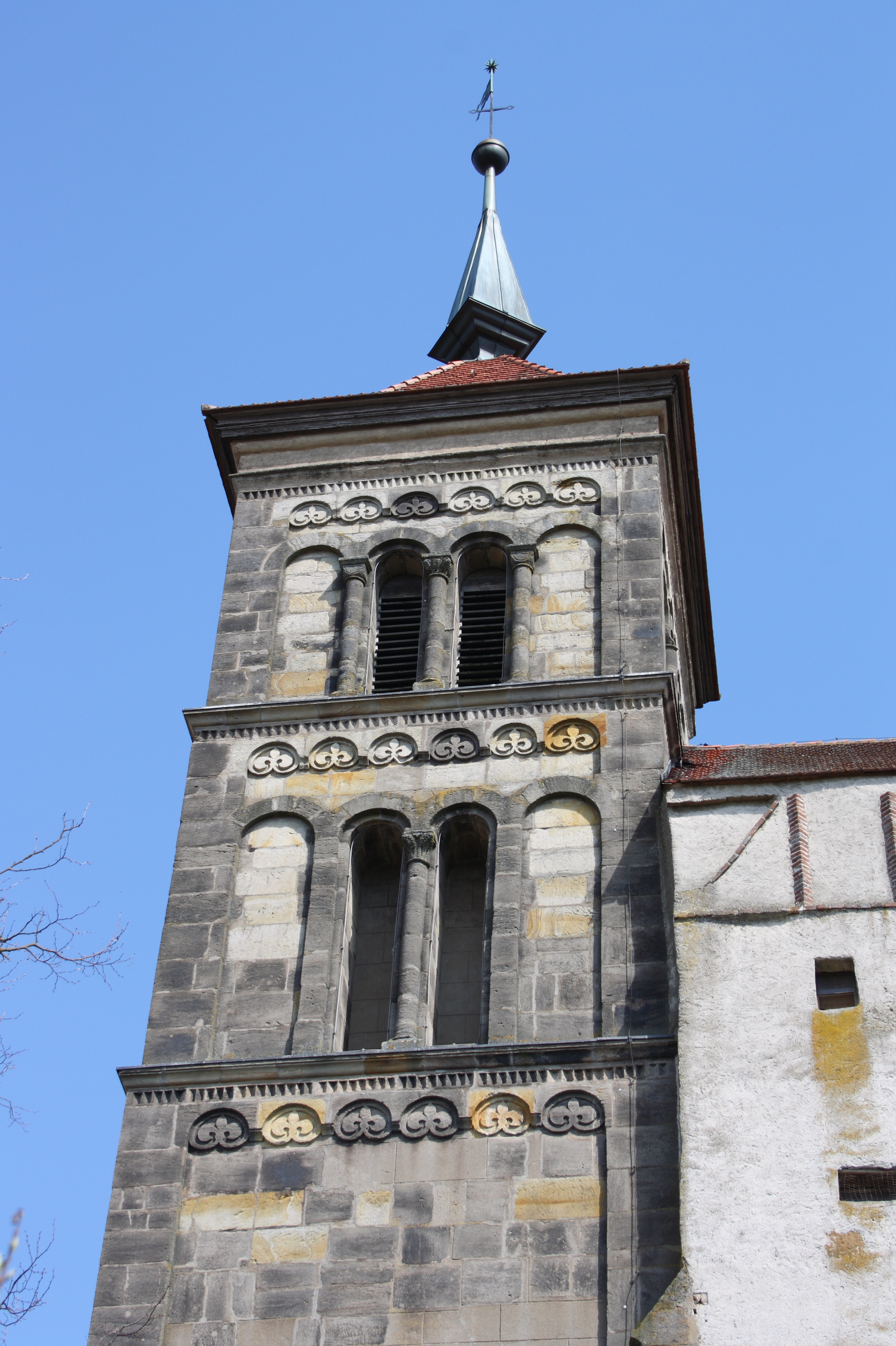 Evangelische Pfarrkirche, ehemalige Benediktinerklosterkirche St. Maria in Auhausen im Landkreis Donau-Ries (Bayern), romanischer Nordturm